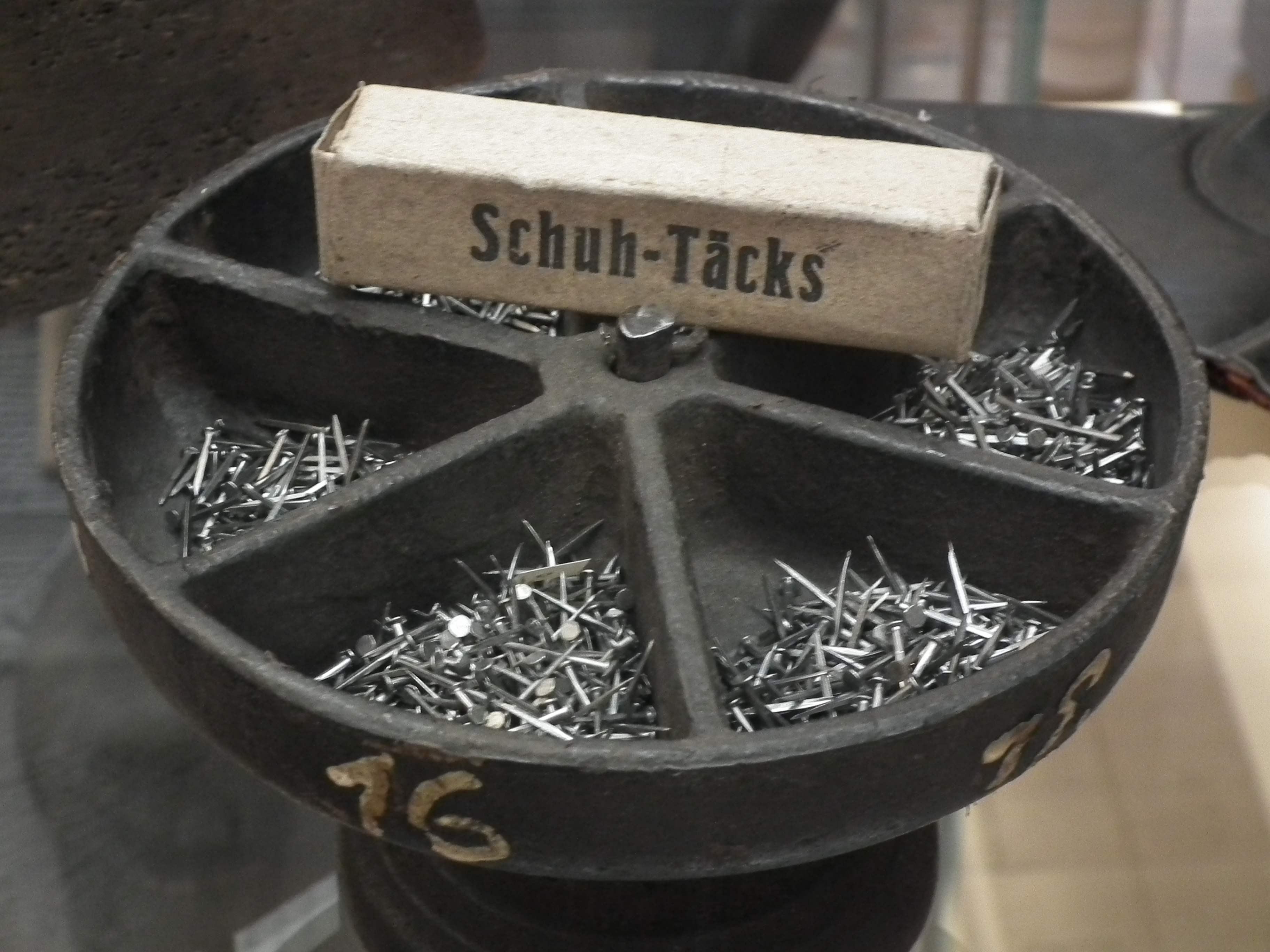 Stadtmuseum Meißen Ausstellung